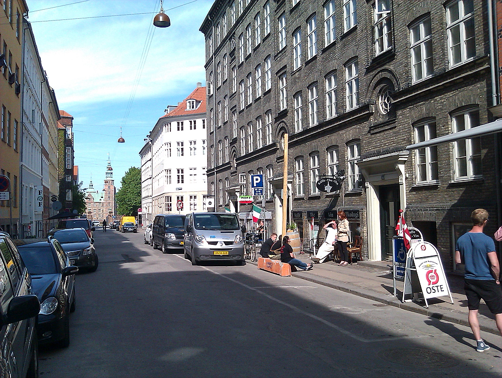 Rosenborggade, København